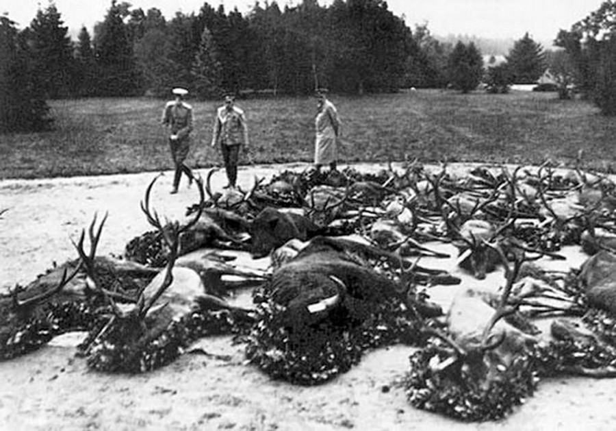 Николай II после охоты